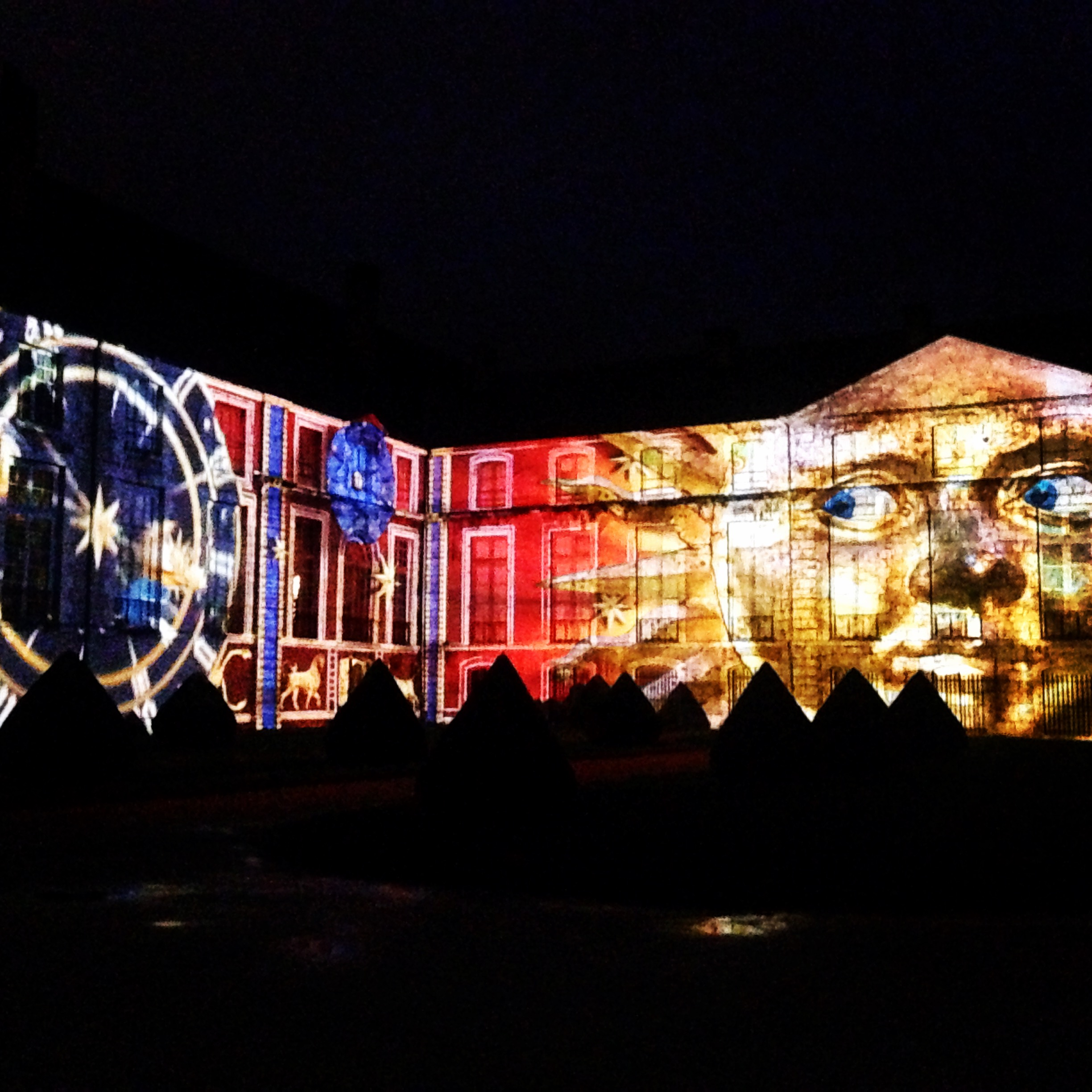 Musée des Beaux-Arts côté Jardins de l’Évêché - "Luna", une scénographie réalisée par Camille Gross et Olivier Magermans